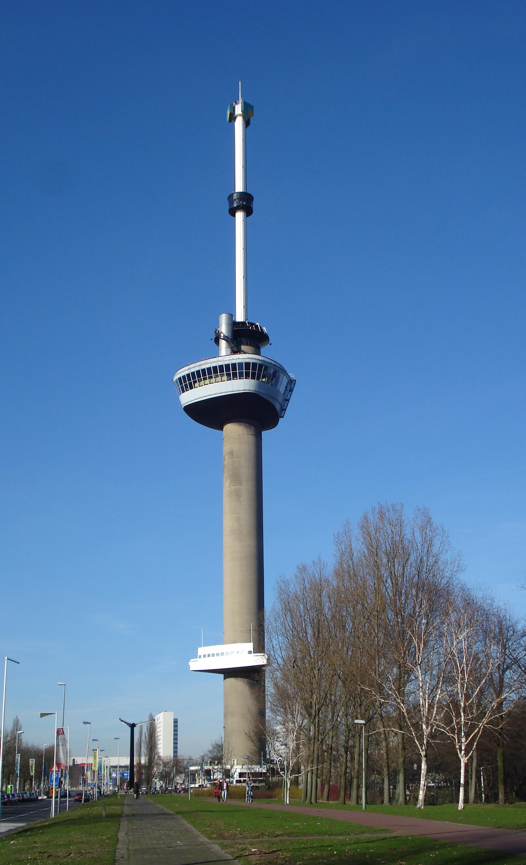 Rotterdam, Euromast. Gemeentemonument.